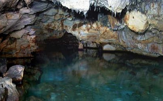 cova